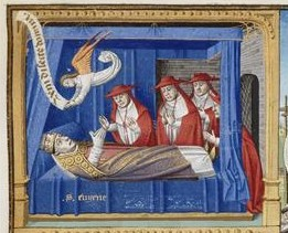 Mort du pape Eugène III.